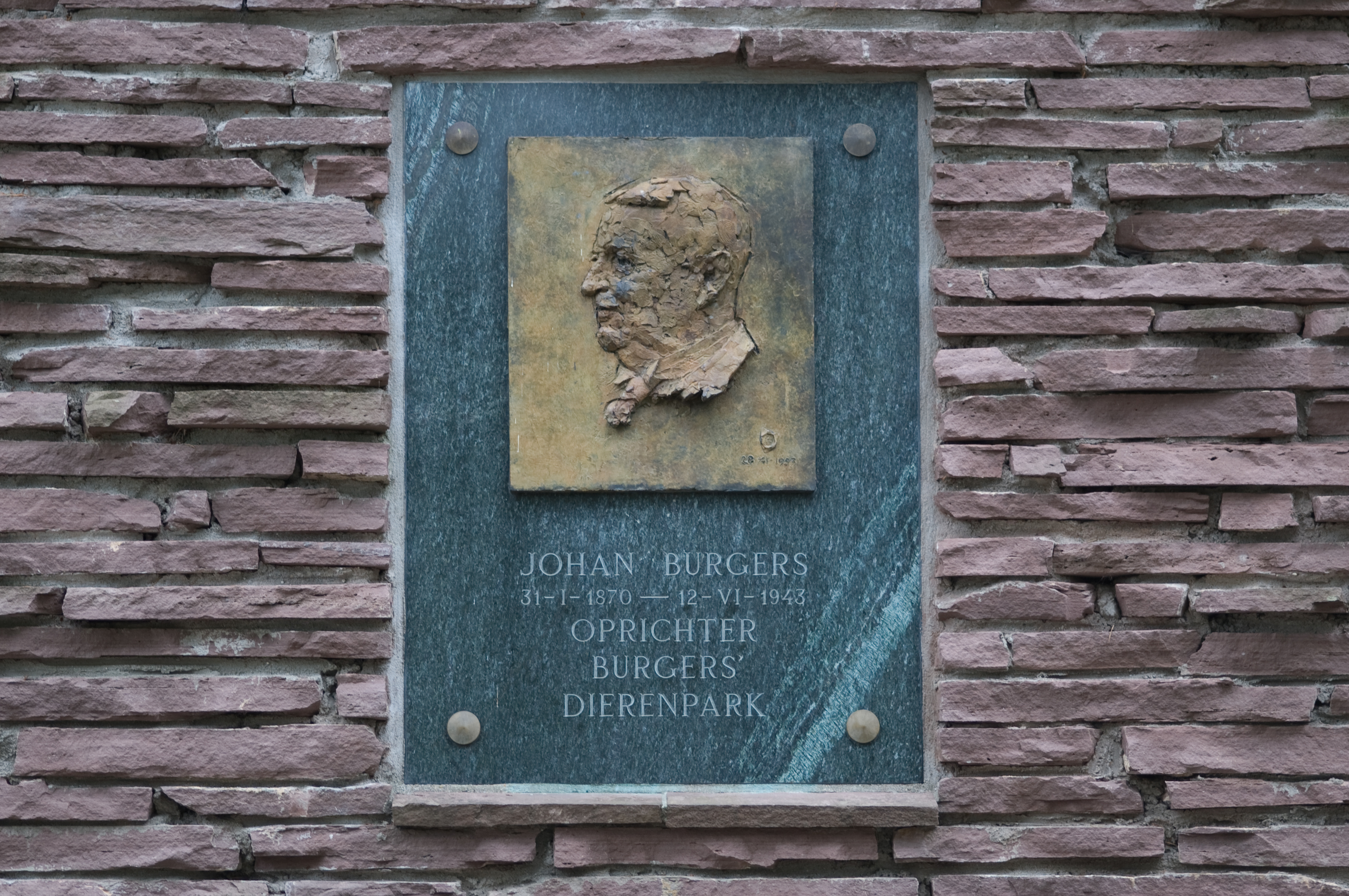 Plaque van Johan Burgers